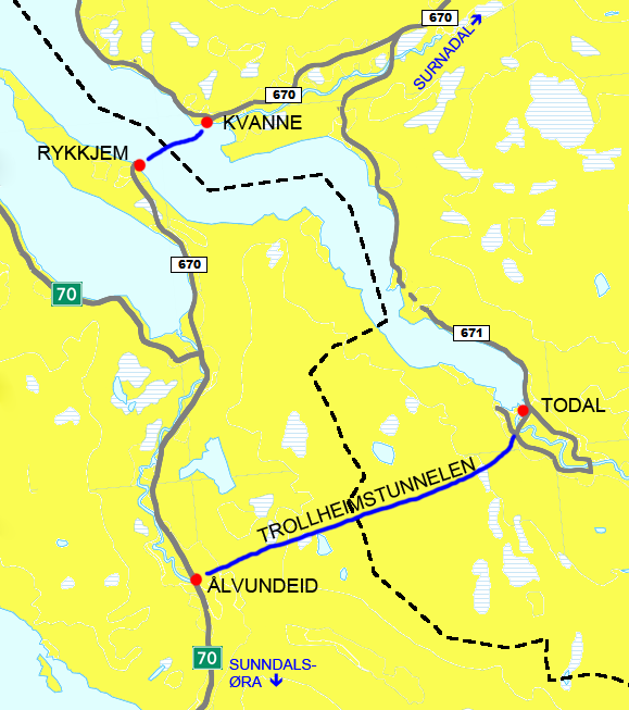 Kart som viser Trollheimstunnelen; en framtidig tunnel mellom Ålvundeid og Todal i Møre og Romsdal. Tunnelen skal erstatte fergesambandet Rykkjem - Kvanne.